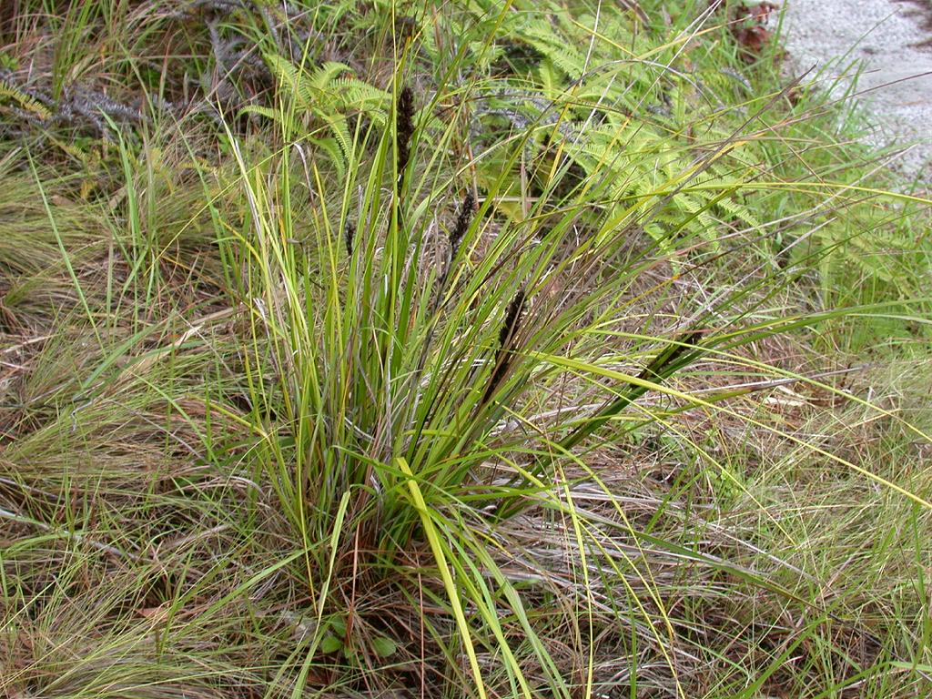 Gahnia tristis (Cyperaceae) Japanese name;kurogaya North of Okinawa Island,Okinawa Pref. Japan